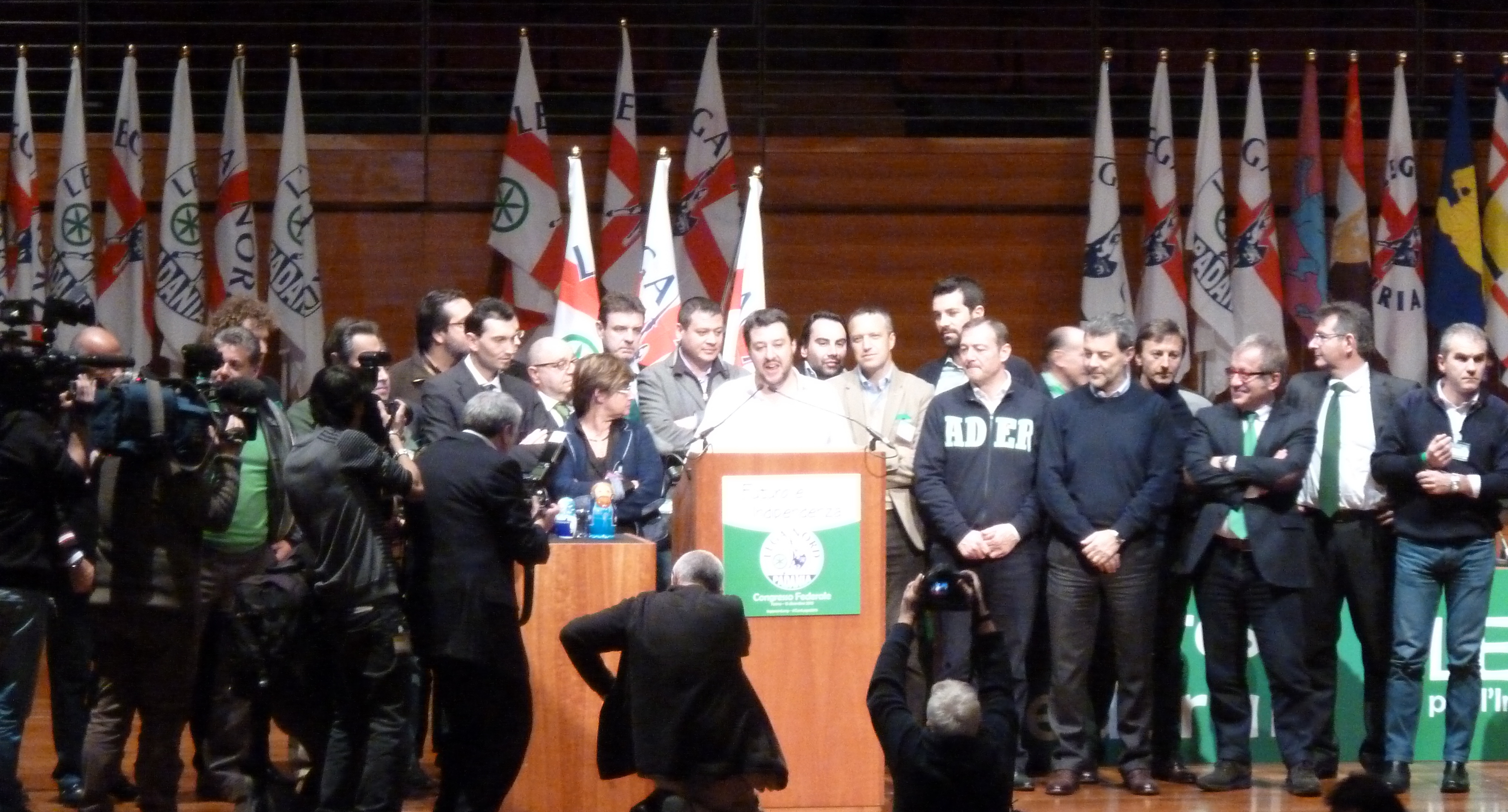 Congresso federale straordinario - Torino, 15 dicembre 2013. Parte conclusiva del discorso del candidato alla segreteria federale Matteo Salvini, attorniato dai sindaci e amministratori locali leghisti, tra cui i governatori Maroni e Cota, il sindaco di Verona Flavio Tosi e il sindaco di Adro Oscar Lancini.